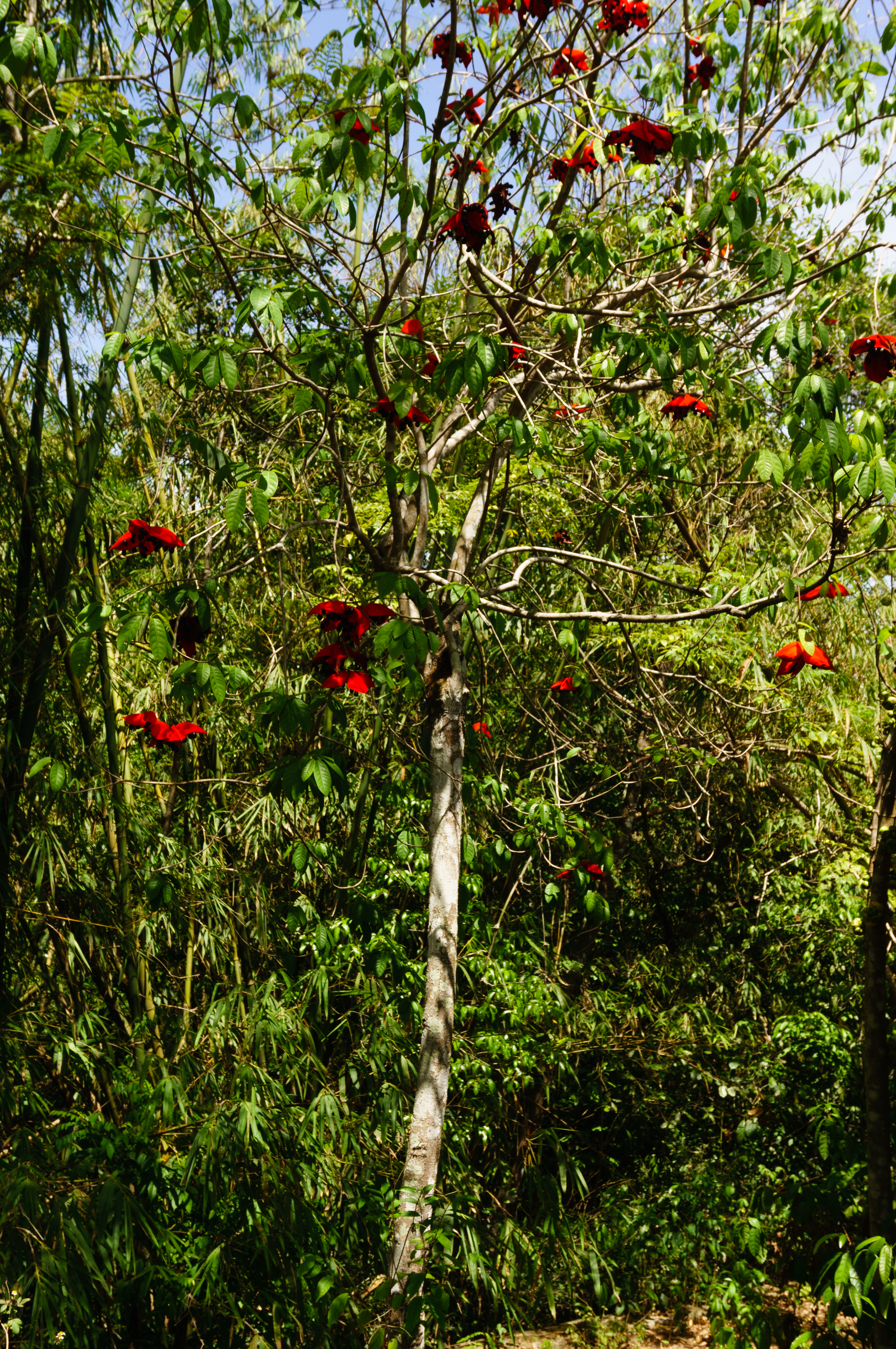 Cây Sang (tên khoa học Sterculia lanceolata), còn gọi Sang sé; Sảng; Trôm mề gà; Trôm lá mác; Trôm thon; Che van...thuộc chi Trôm. Một số địa phương như Huế, Việt Nam gọi đây là cây ươi; do đó: đừng nhầm với loại cây cùng chi Trôm: Ươi, đười ươi, lười ươi, an nam tử, cây thạch, ươi bay, bàng đại hải (danh pháp khoa học:Sterculia lychnophora) là loại cây có giá trị kinh tế cao.